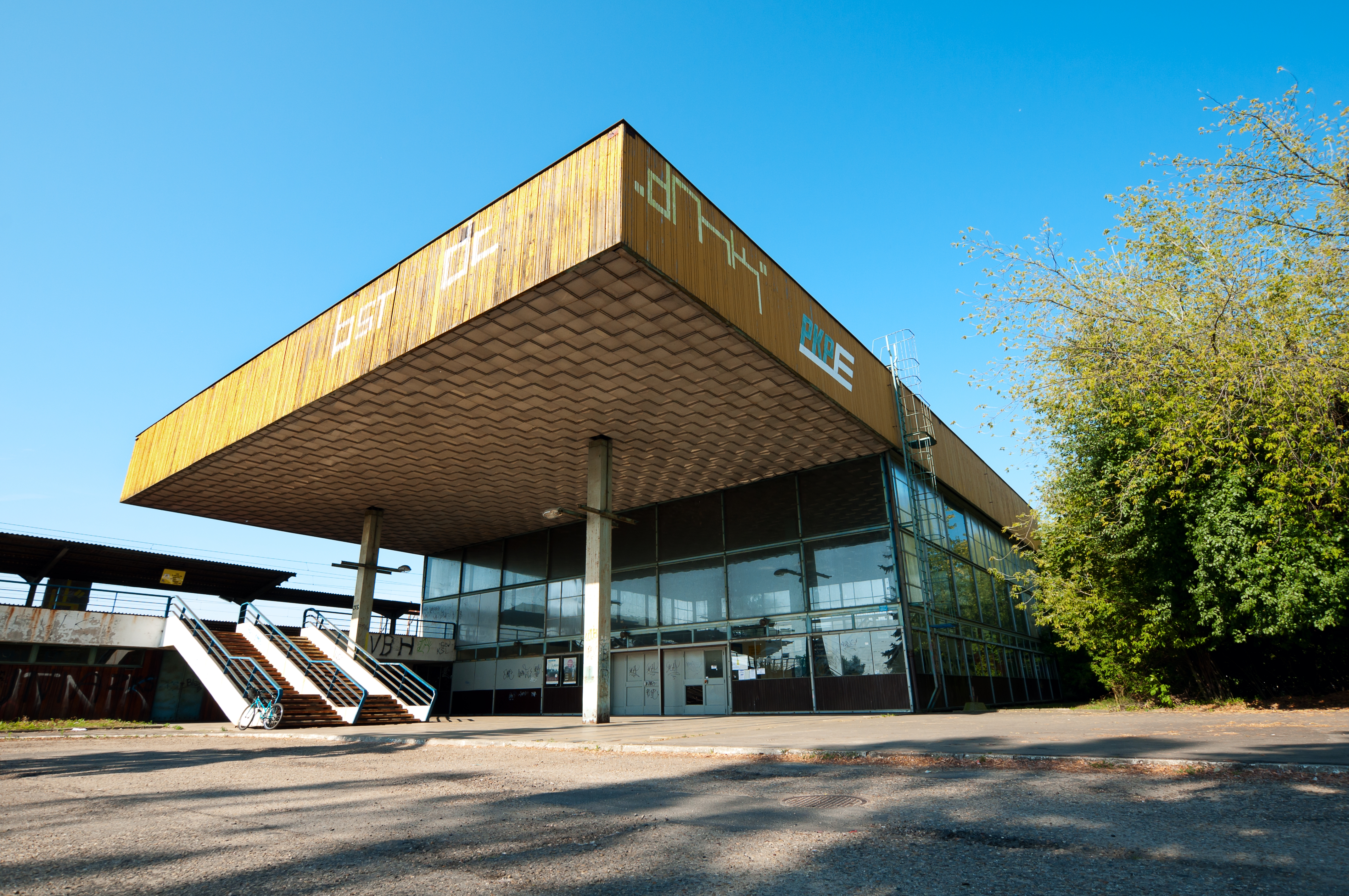 Budynek stacji kolejowej Tarnów-Mościce (1976) w Polsce z widoczną częścią peronu I i wejściem nań oraz parking przed stacją. Dworzec kolejowy o wysokich walorach architektonicznych jest mocno zakorzeniony w tradycji zachodnioeuropejskiego modernizmu i nawiązuje do najwybitniejszych jego realizacji. Nietypowe bo całkowite przeszklenie budynku wzorowane jest na światowej architekturze nowoczesnej i nadaje mu lekkość i ponadczasowość. Przykład wyjątkowo oryginalnego wzornictwa (designu) z czasów socjalizmu paradoksalnie pozbawionego ówczesnej skromności i bylejakości obejmującego schody przypominające ruchome schody, aluminiowe sufity, lampy rtęciowe oraz ławki przypominające fotele lotnicze lub fotele maszynisty nowoczesnego pociągu. Pierwotnie na dworcu użyta została szwajcarska czcionka Helvetica będąca synonimem dobrego designu, czarna na białym tle. Przykład dworca kolejowego o wybitnej, nowatorskiej i bogatej w znaczenia architekturze, który podobnie jak ponadczasowy i pozytywnie oceniany przez krytykę Warszawski Dworzec Centralny (1975) wyróżnia się pozytywnie ze złej i typowej architektury czasów PRL, którą reprezentował na przykład dworzec kolejowy w Płaszowie (1967). Widoczne na zdjęciu efekty zasłonięcia okien blachą na parterze, zamalowane drzwi oraz przypadkowa kolorystyka nie są ideą architekta.